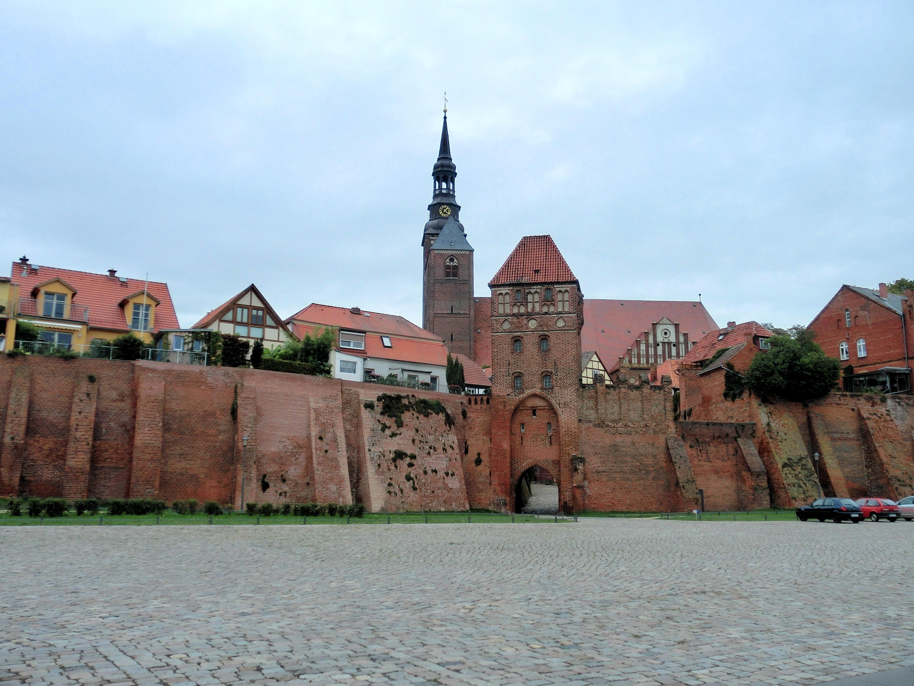 Tangermünde, Blick vom Hafen auf die Stadtmauer